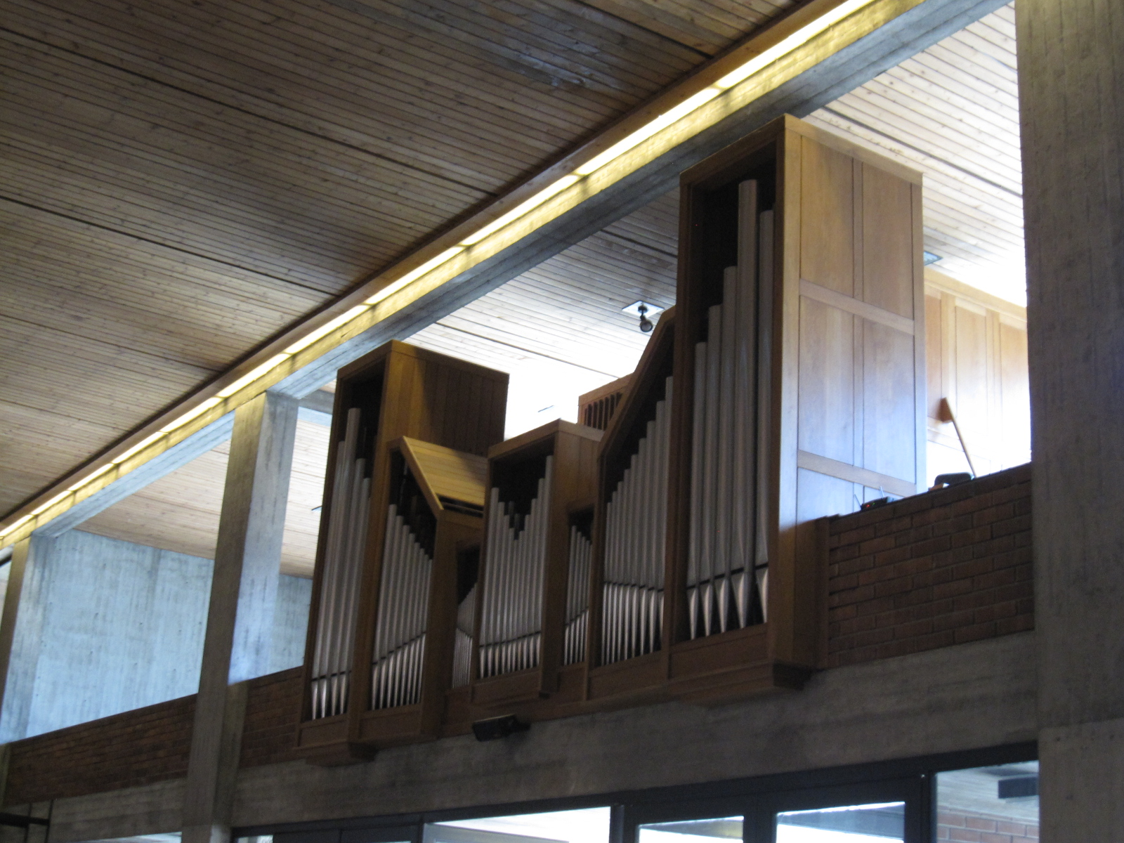 Pötzleinsdorfer Pfarrkirche Christkönigskirche